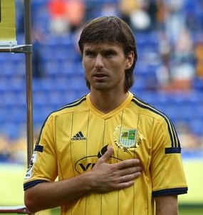 Кирилл Сергеевич Ковальчук